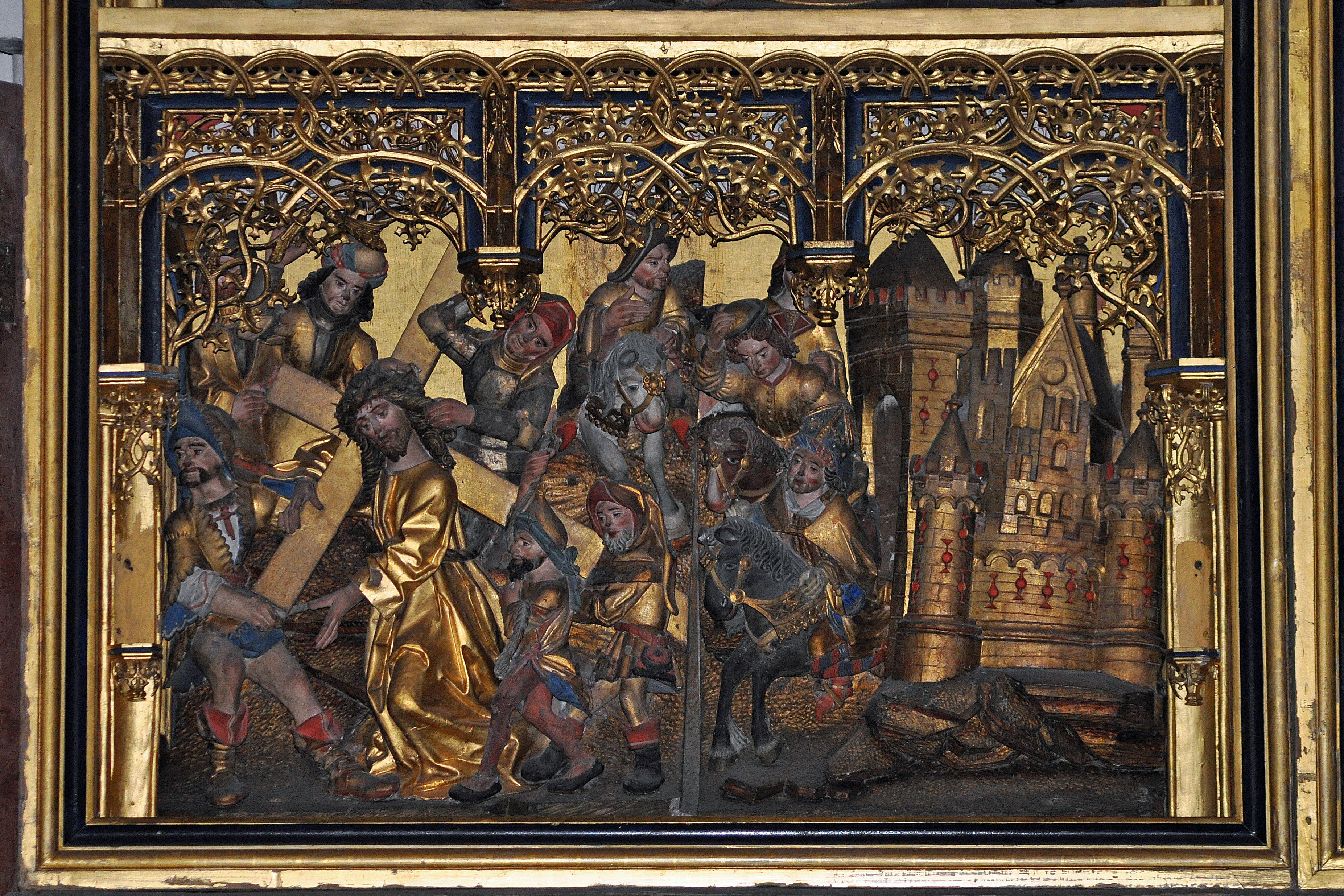 Stralsund, Nikolaikirche, Hochaltar, Schnitzkasten links unten (2012-12-29) 1, by Klugschnacker in Wikipedia